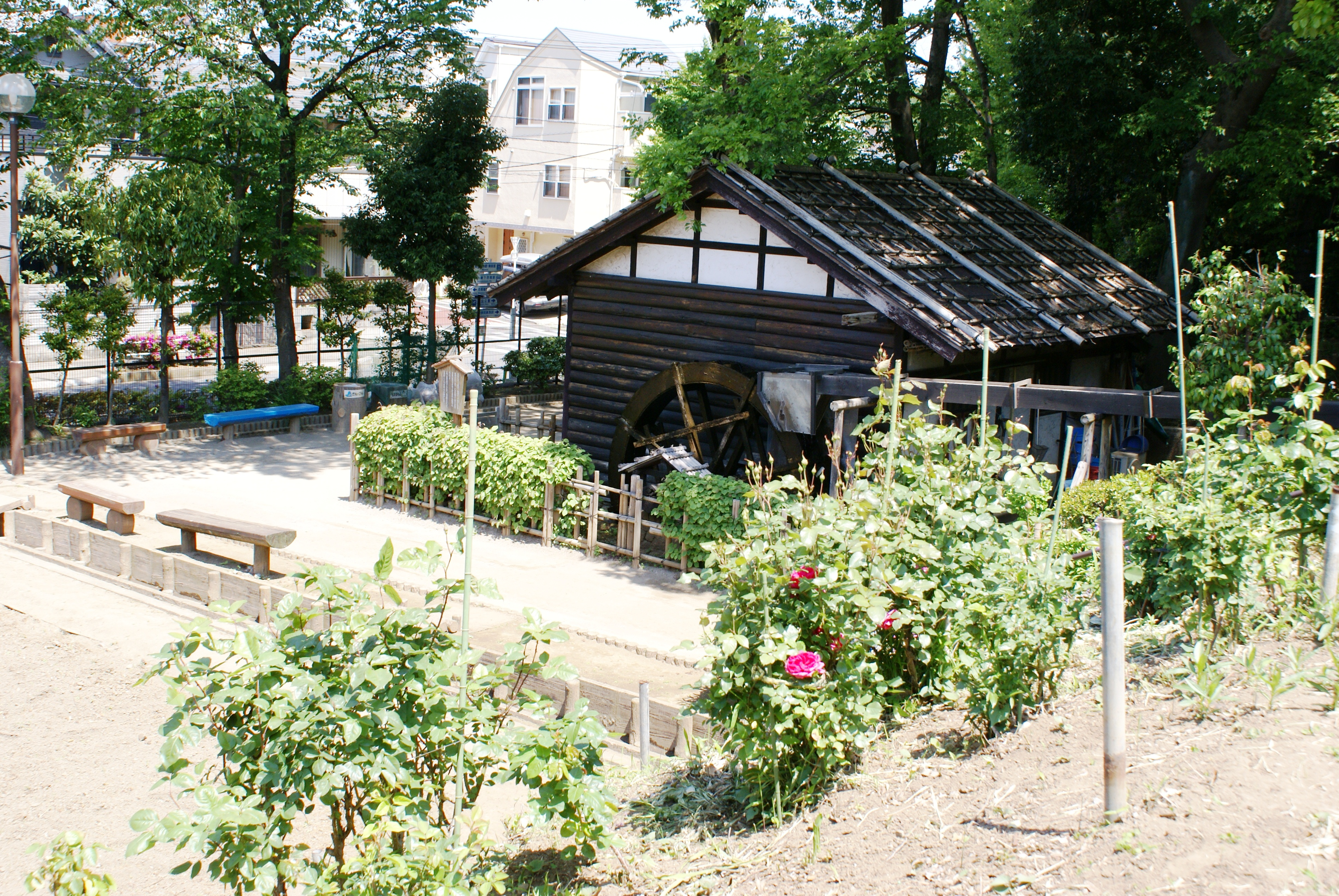 四葉一丁目水車公園